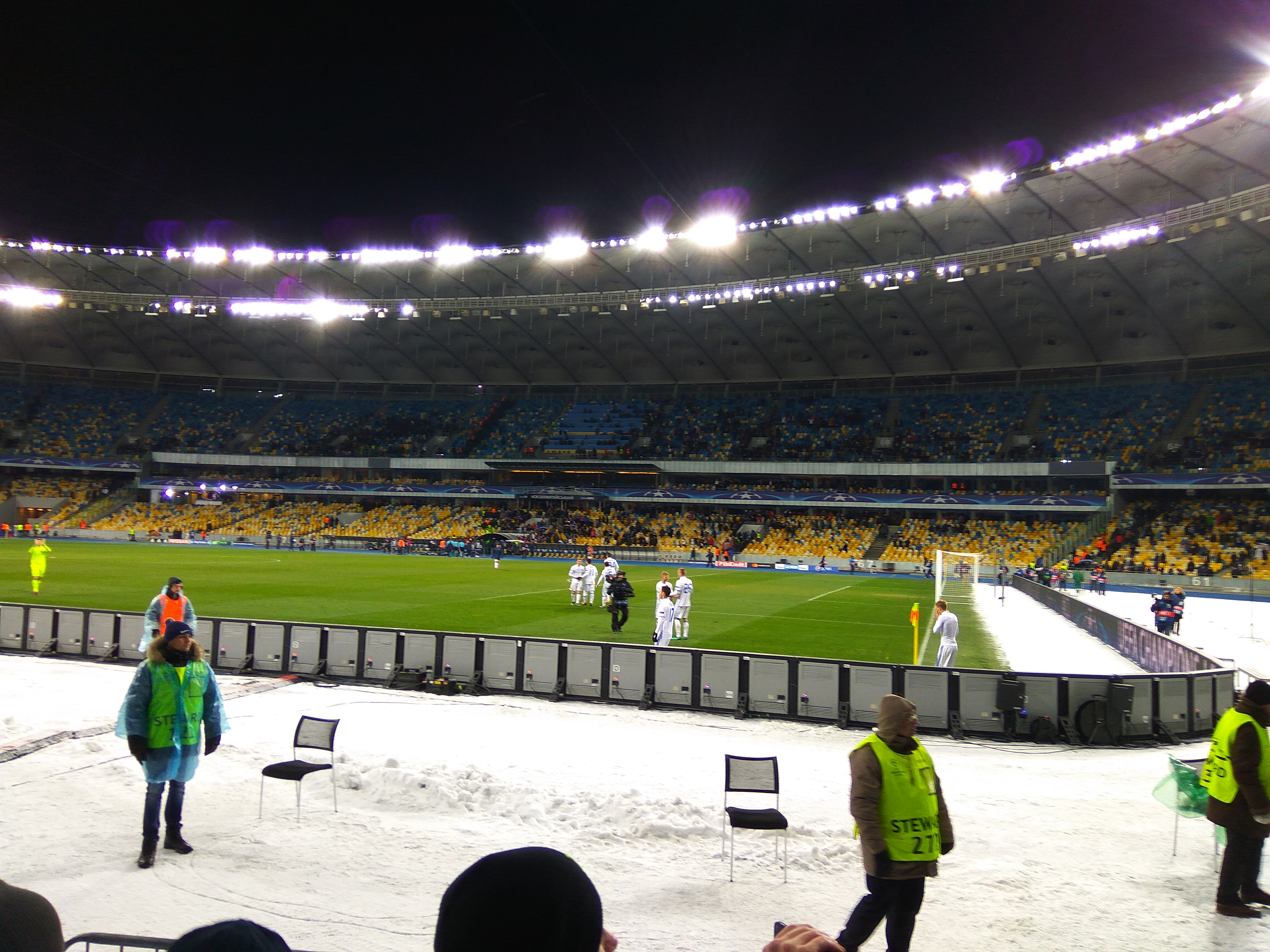 Гравці київського Динамо після перемоги над Бешікташем 6-0 в Лізі чемпіонів